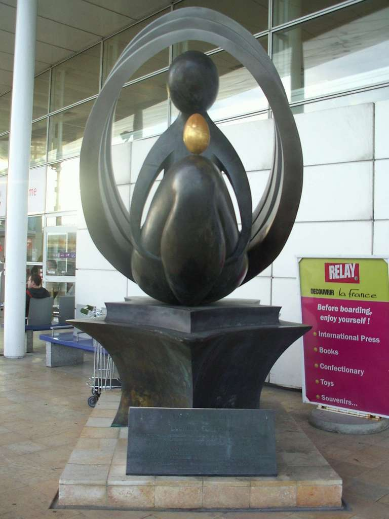 Sculpture à Coquelles